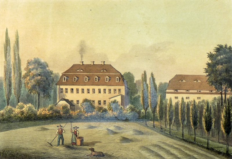 Merzdorf bei Riesa aus: Album der Schlösser und Rittergüter im Königreiche Sachsen .... Section II: Meissnischer Kreis (Leipzig: Expedition des Albums Sächsischer Rittergüter und Schlösser 1856). - Unterhalb betitelt. Druck bei L. Blau & Co. in Leipzig.